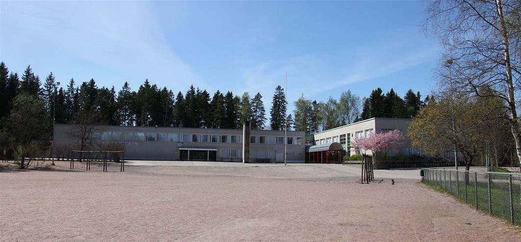 Päiväkummun koulu on Vantaan Koivukylän suuralueen Päiväkummun kaupunginosassa sijaitseva suomenkielinen alakoulu. Rakennus valmistui alkujaan vuonna 1968; sitä laajennettiin ja kunnostettiin vuonna 2000.